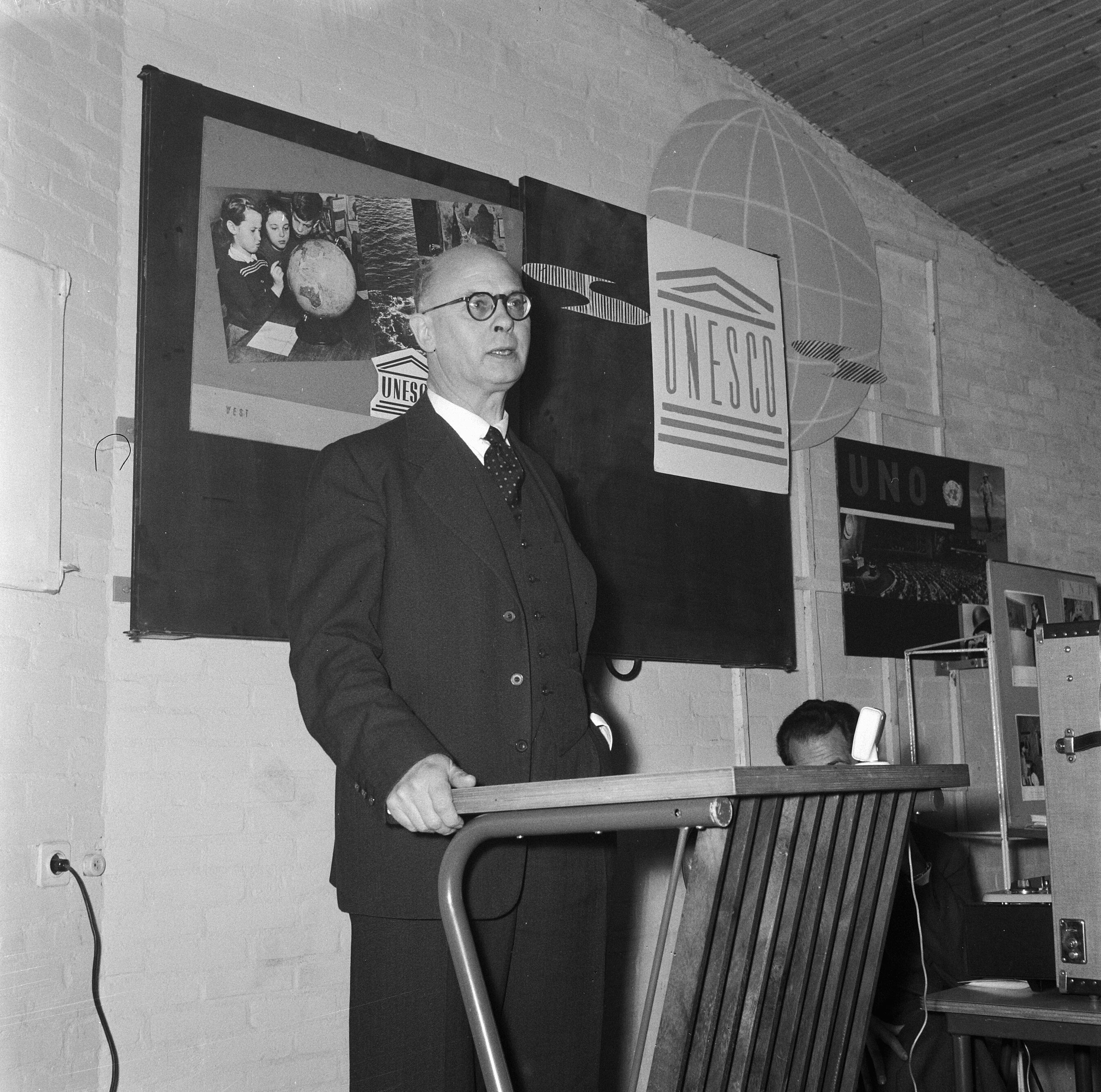 Collectie / Archief : Fotocollectie Anefo Reportage / Serie : [ onbekend ] Beschrijving : Prof.C. C. Berg Datum : 11 januari 1958 Persoonsnaam : Prof.C. C. Berg Fotograaf : Koch, Eric / Anefo Auteursrechthebbende : Nationaal Archief Materiaalsoort : Negatief (zwart/wit) Nummer archiefinventaris : bekijk toegang 2.24.01.03 Bestanddeelnummer : 909-2446